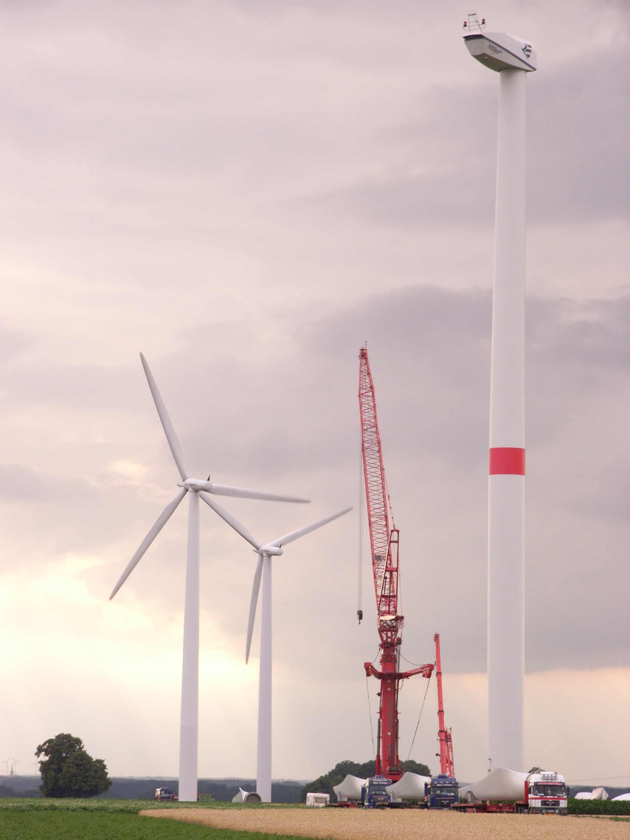 Errichtung von Windkraftanlagen zwischen Lövenich und Glimbach in der Erkelenzer Börde